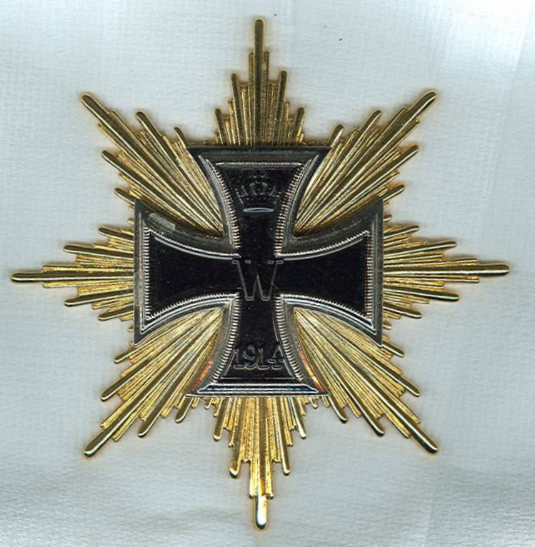 Hindenburgster (scan van een zg. museumscopie)